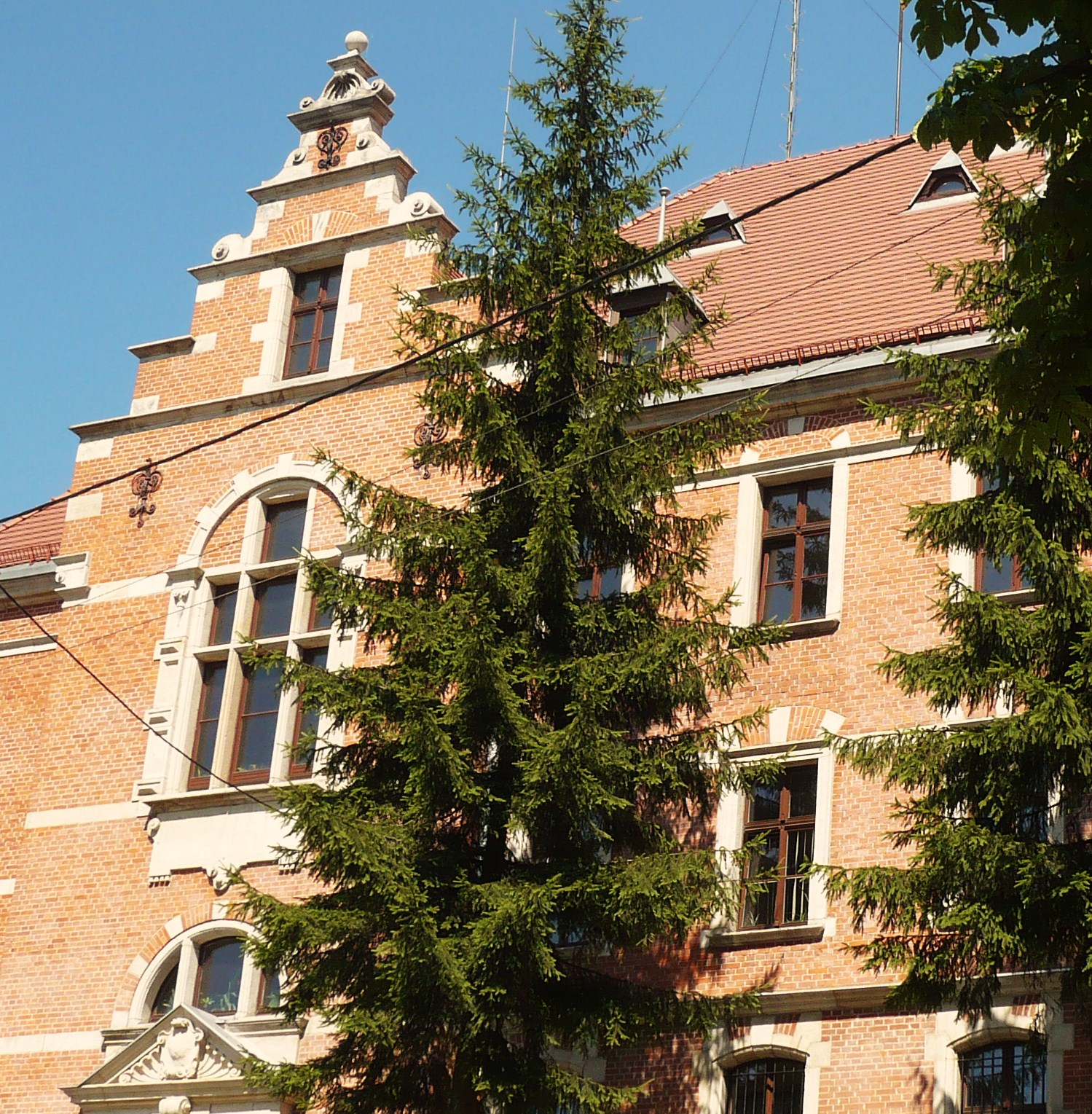 Nowa Ruda, ul. Bohaterów Getta 29 - pierwotnie sąd, obecnie komisariat policji, 1887-1889